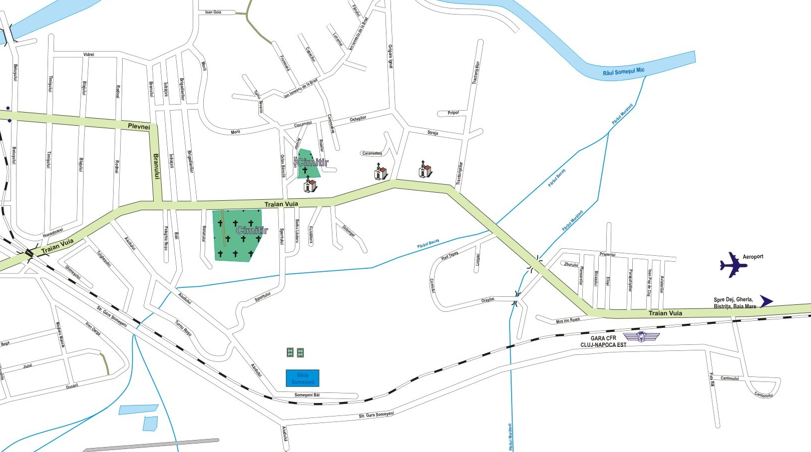 Harta zonei Someseni, Cluj-Napoca